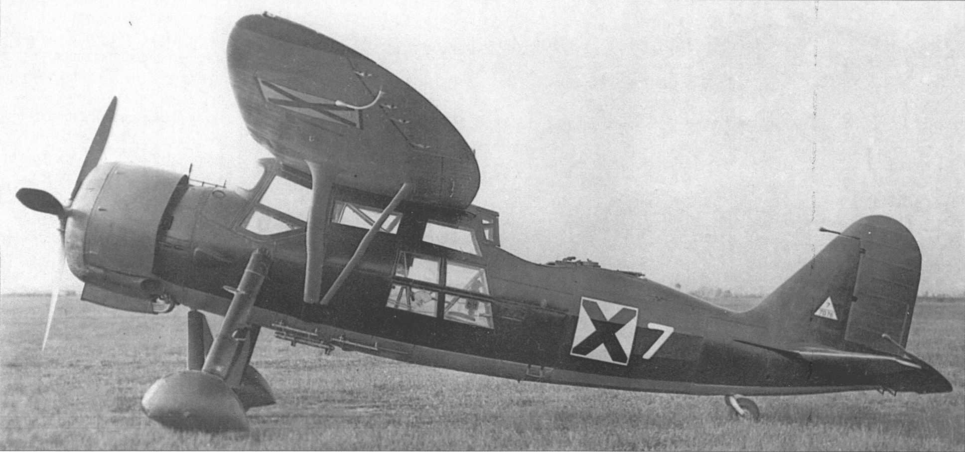 SFKB KB-11 "Fasan" Naher Scout. Einmotorige Ganzmetall-Hochdecker, festem Fahrwerk. Entwickelt von Samoletna Fabrika Kaproni Bulgarski (SFKB) unter der Leitung von K. Calligaris. Motor - in Abhängigkeit von der Änderung, die Besatzung des Flugzeugs - 2 Personen. Bewaffnung 4x7, 69, eine Bombe von bis zu 400 kg. Der Prototyp des KB-11 flog erstmals im Jahre 1941, begann im gleichen Jahr die Massenproduktion in der Fabrik des SFKB in Kazanlak (seit 1942 verstaalicht in die DAR). Insgesamt produziert etwa 40 Exemplare. CB-11. Auslaufen der Serie bis Ende 1942 Bekannte Varianten: - KB-11, die erste Kleinserie mit den Motoren Alfa Romeo 126 RC.34 Tragkraft 6 Personen. - KB-11 ist ein Motor mit "Pegasus" XXI. Das Flugzeug wurde an die bulgarische Luftwaffe ab dem Ende 1941 geliefert wurde im Kampf gegen den bulgarischen und jugoslawischen Partisanen eingesetzt. Im Oktober - November 1944 KB-11, waren Teil der Aufklärungs-Schwadron an der Front, gegen die Deutschen auf dem Territorium der Republik Bulgarien und Jugoslawien, dann in Flugschulen als Schulflugzeug eingesetzt. Im Jahr 1946 wurden die überlebenden Exemplare von Bulgarien an Jugoslawien als Teil der Reparationen aus einen Friedensvertrag übertragen und wird betrieben von der jugoslawischen Luftwaffe bis 1956.